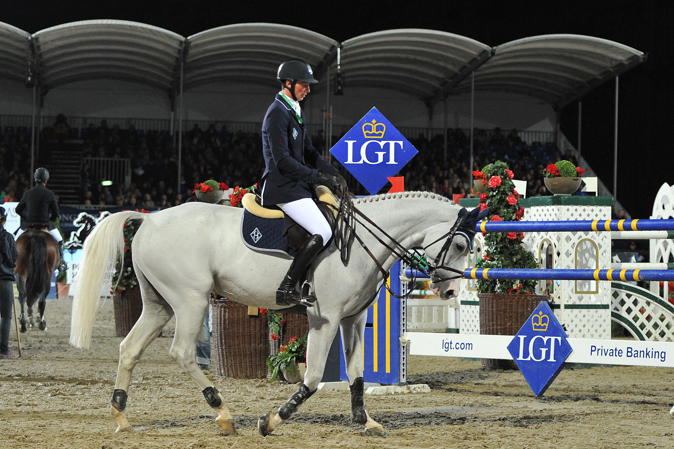 Vienna Masters am 21. September 2013 Longines Global Champions Tour Daniel Deusser (GER) auf Cornet d'Amour